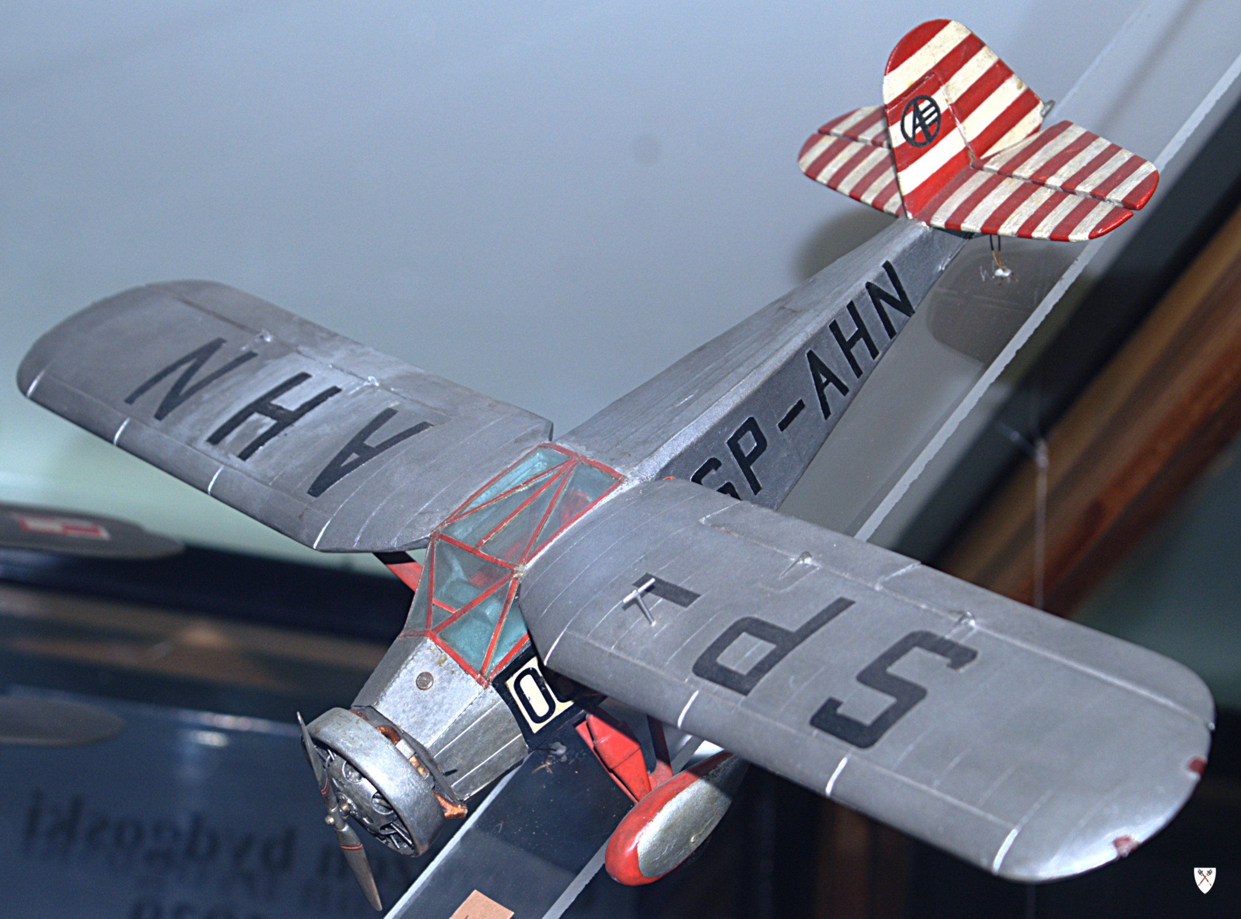 Model samolotu RWD 6 w Pomorskim Muzeum Wojskowym.